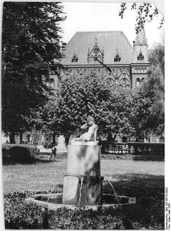 Rostock, Rosengarten, Ständehaus Zentralbild Löwe 4.6.46 Rostock wird Ende Juni, Anfang Juli Treffpunkt junger Menschen aus den nordischen Ländern und den Ostseebezirken der DDR sein. UBz: Rostock: Rosengarten mit VVN Gedenkstein im Hintergrund und dem alten Ständehaus, jetzt Haus der Offiziere der Volkspolizei-See.